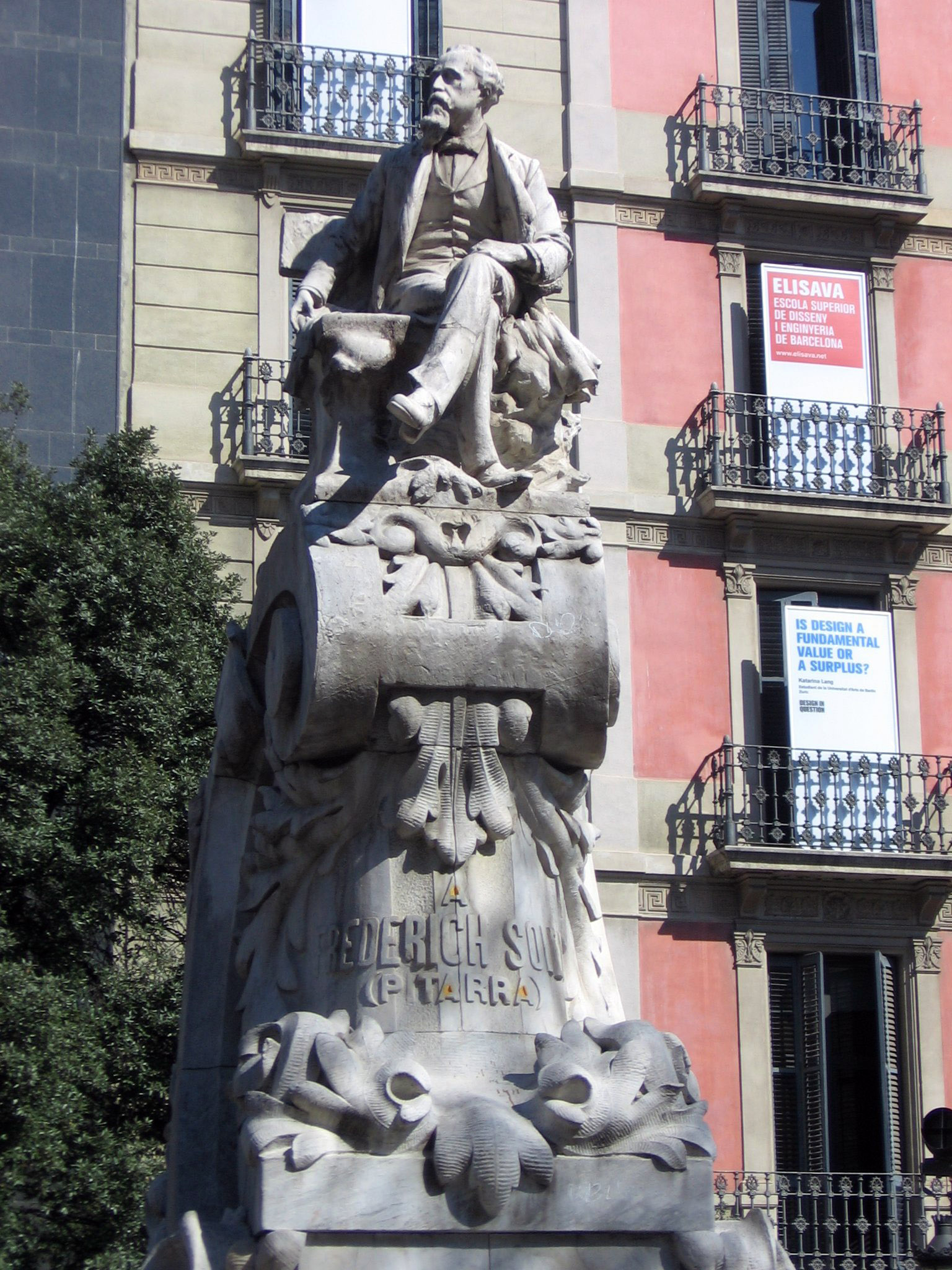 Monumento a Serafí Pitarra, Agustí Querol.